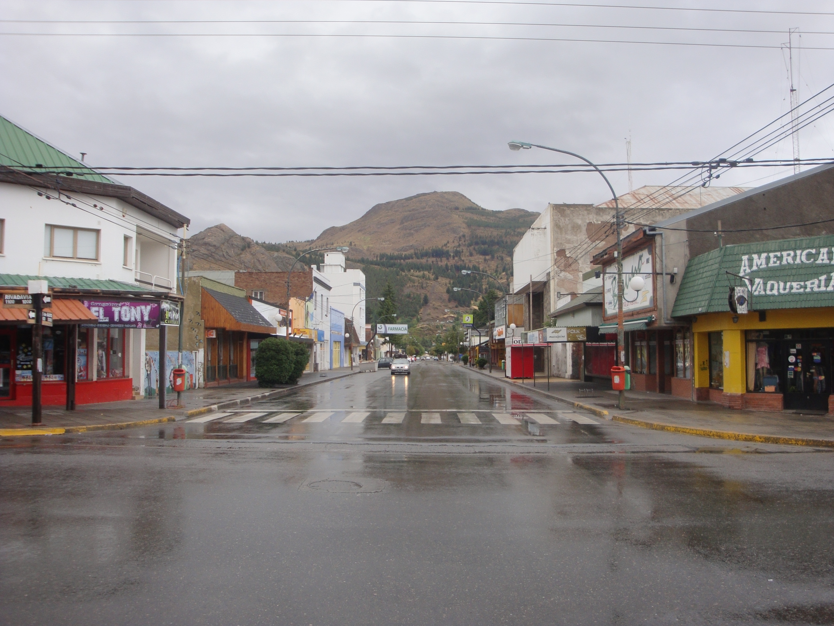 Intersección de las calles Rivadavia y 25 de Mayo, Esquel, Provincia del Chubut, Argentina.